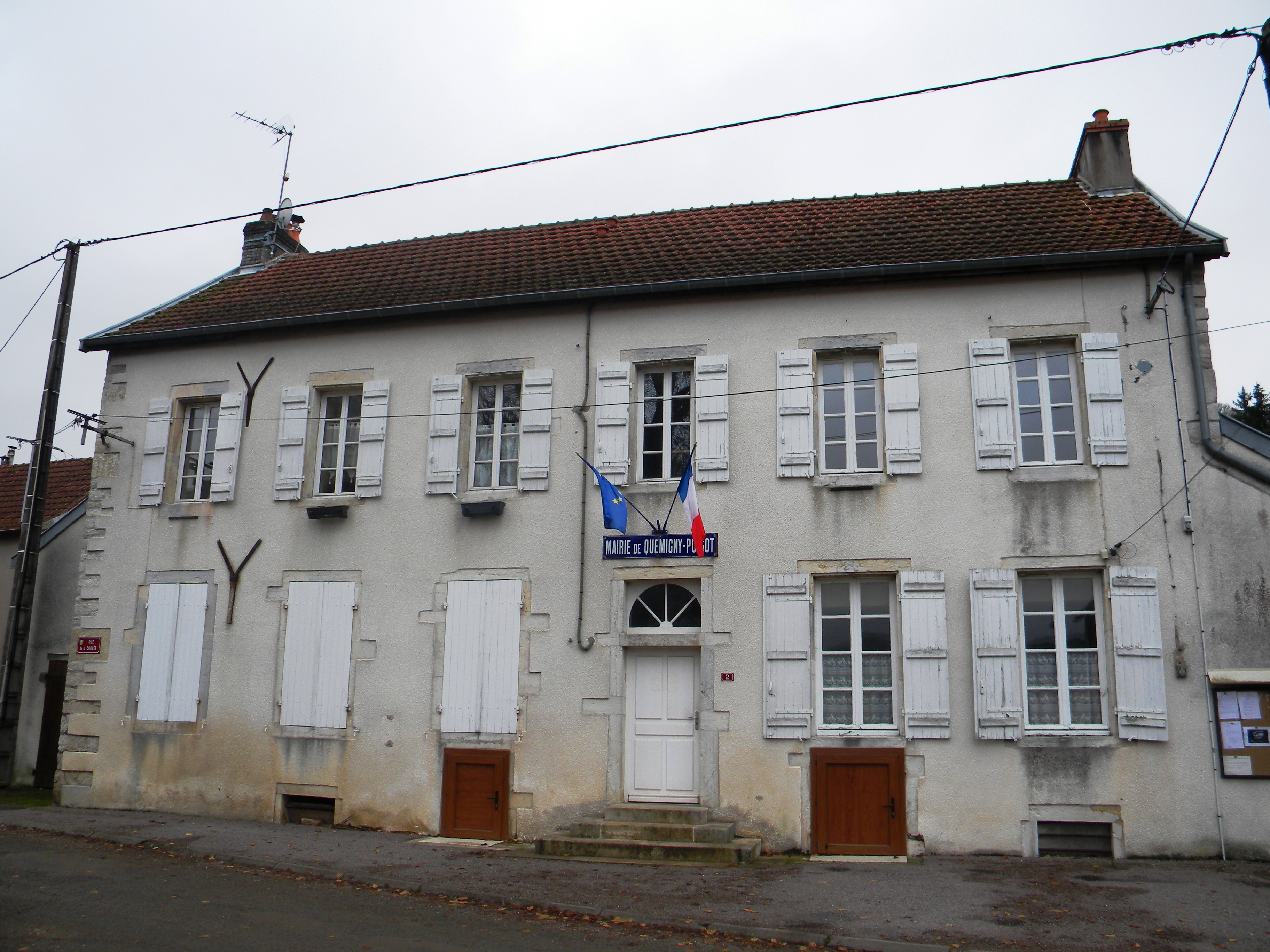 Urbodomo de Quemigny-Poisot